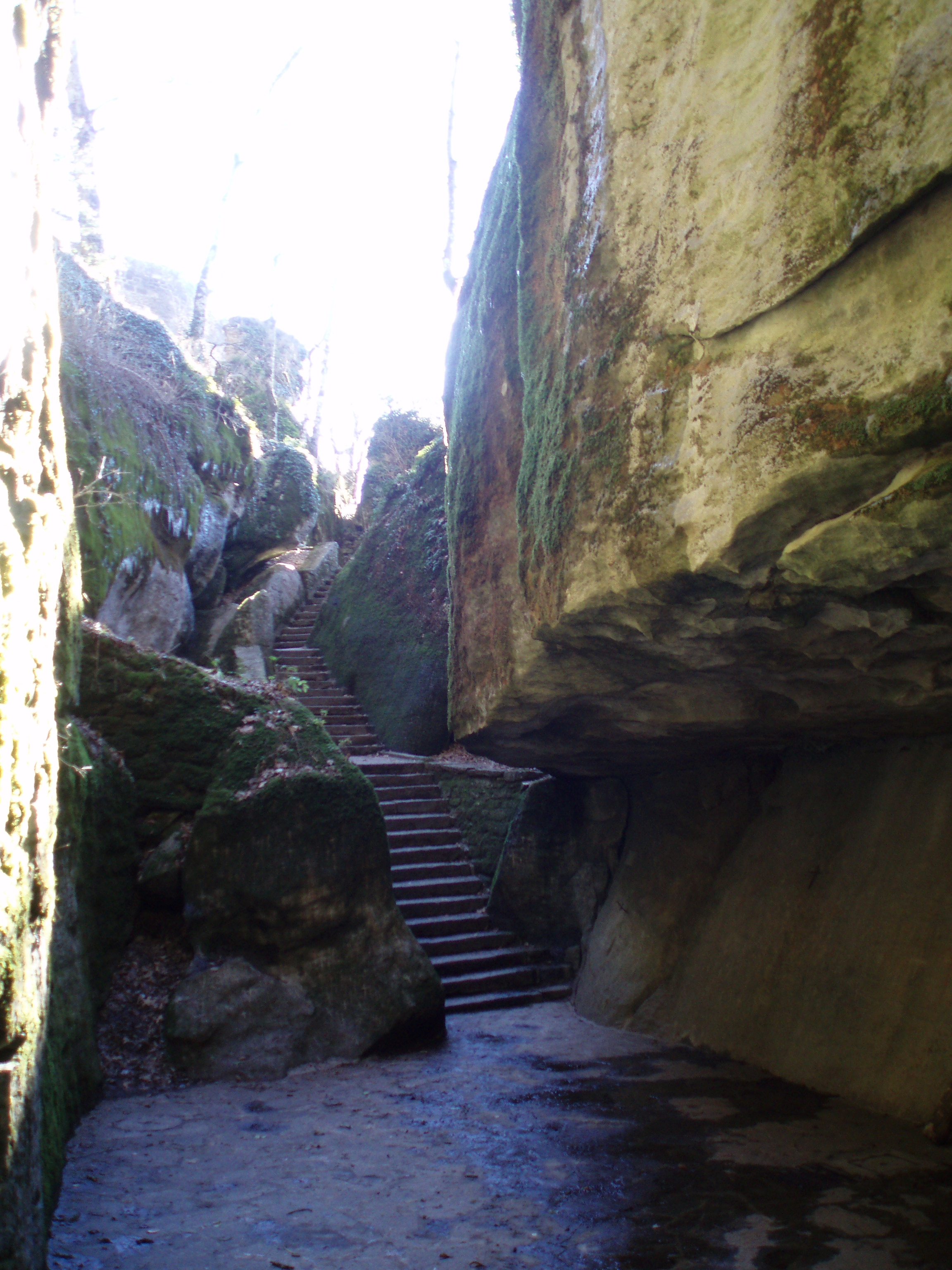 Santuario della Verna - 10 - Sasso Spicco